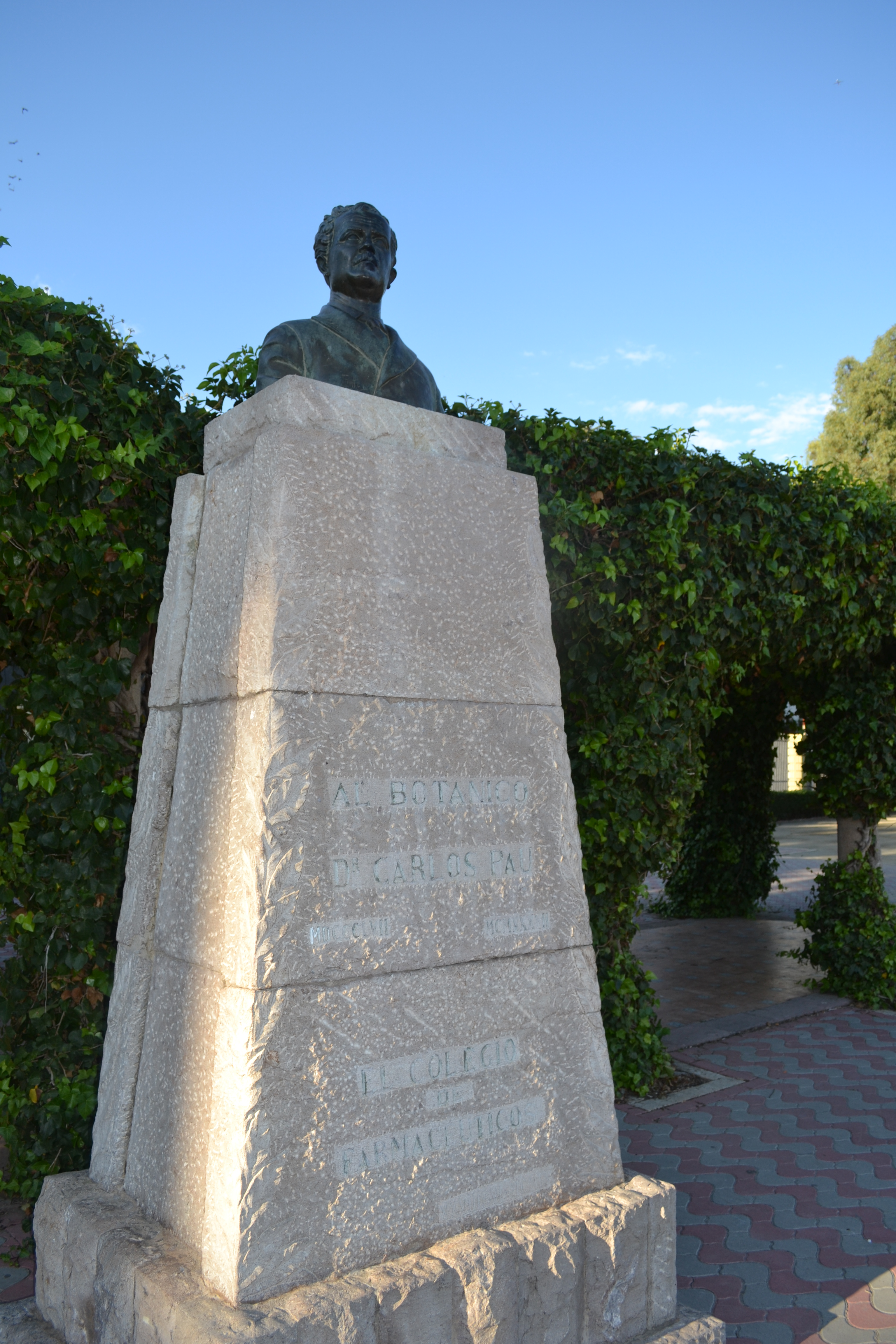 Busto de Carlos Pau Español en Segorbe, su pueblo natal.